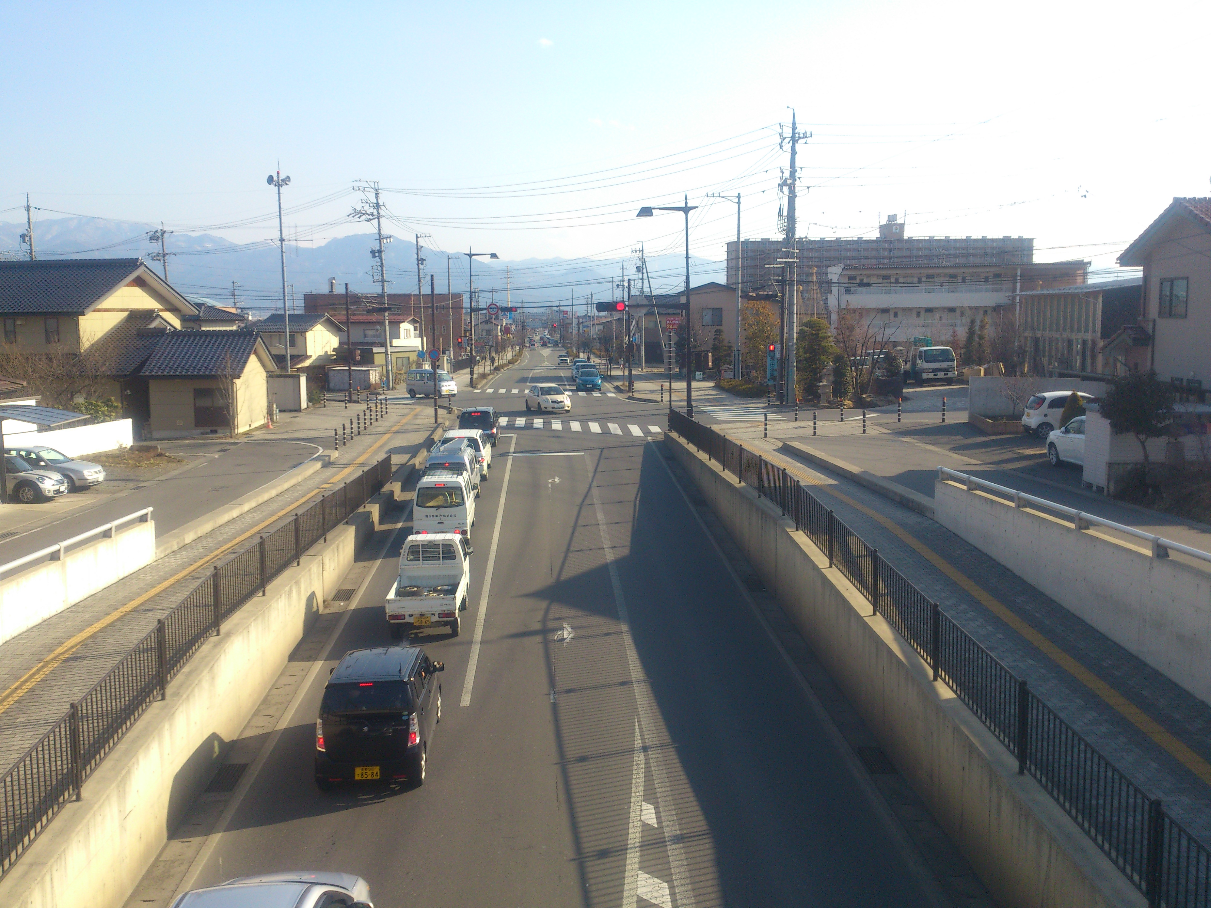 東豊線（長野市吉田四丁目）